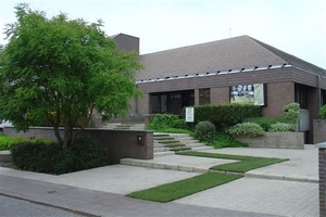 Entrée du campus ISIa de Gembloux